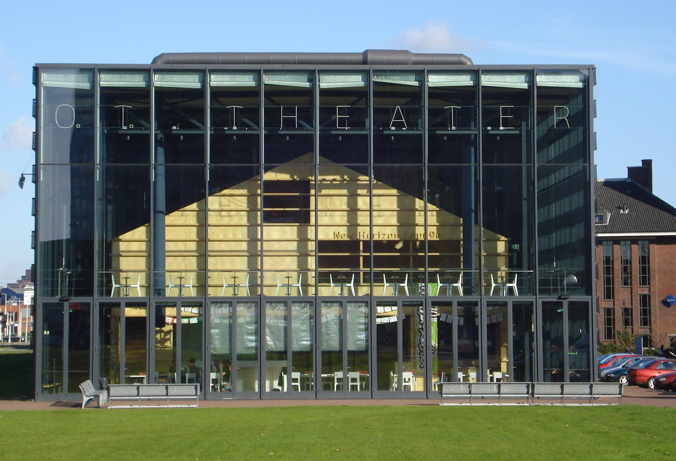 Rotterdam, St. Jobsweg. OT-theater (Onafhankelijk Toneel).